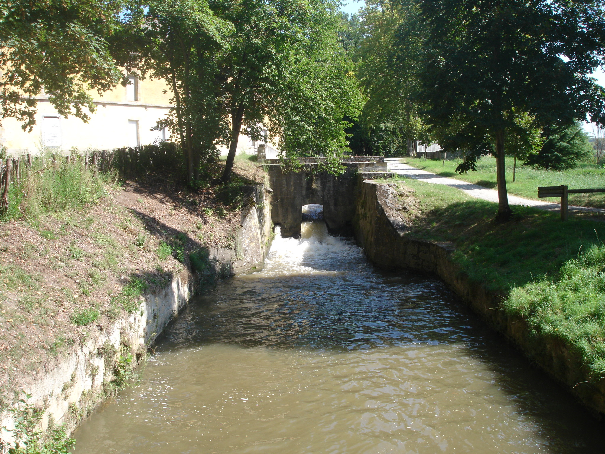 France, Aude (11), Seuil de Naurouze, arrivée de la rigole de la plaine